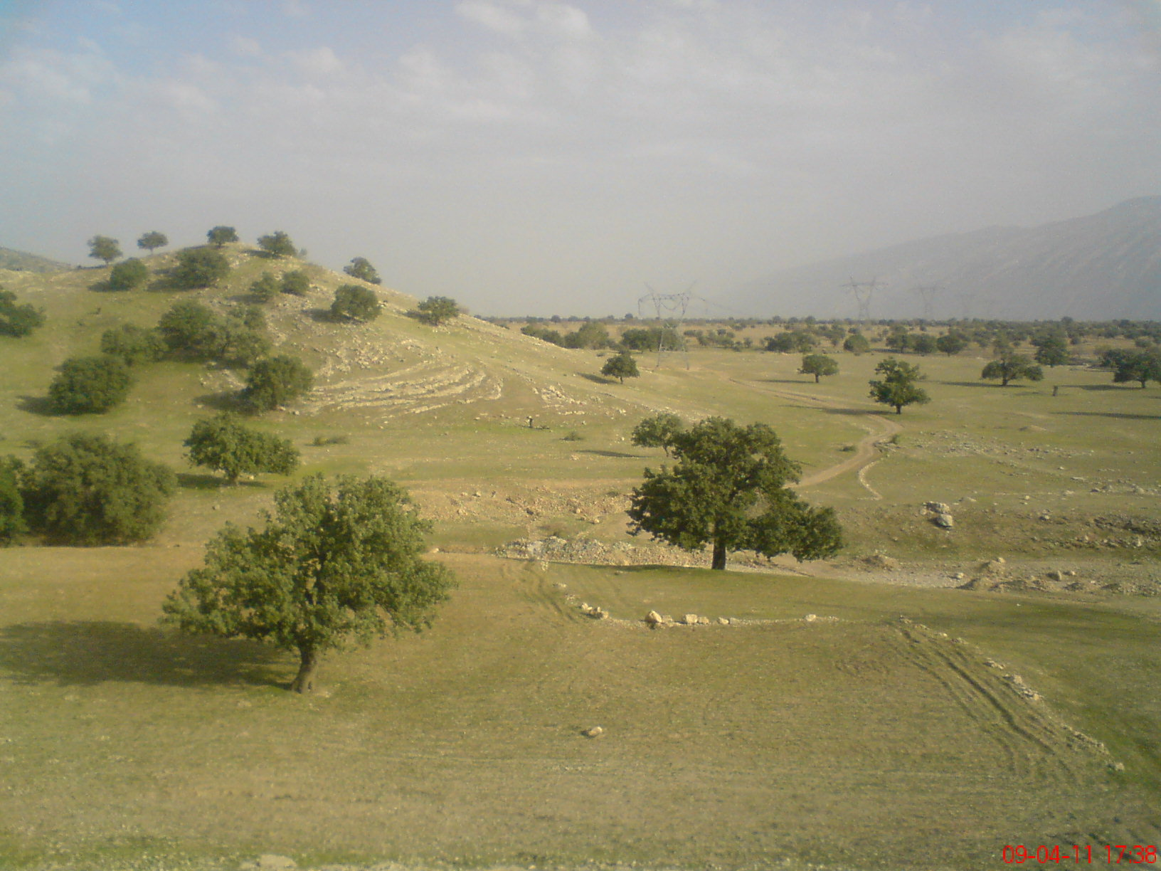 قائمیه1390